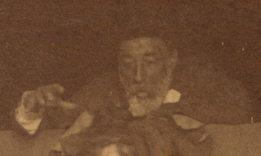 Gruppo umoristico. L'autore è Alfredo Castellani ( 11 maggio 1856 8 gennaio 1930) Sono presenti nella foto: Augusto Castellani, Guendalina Castellani - Fabri, Pompeo Fabri, Pio Fabri, Anna (Annetta) Fabri, Emma Fabri, Ettore Podio, Adele Botti Podio, Lodovico (o Ludovico) Tuminiello vedi anche La fotografia è stata scattata nel 1886 alla Vigna Castellani.